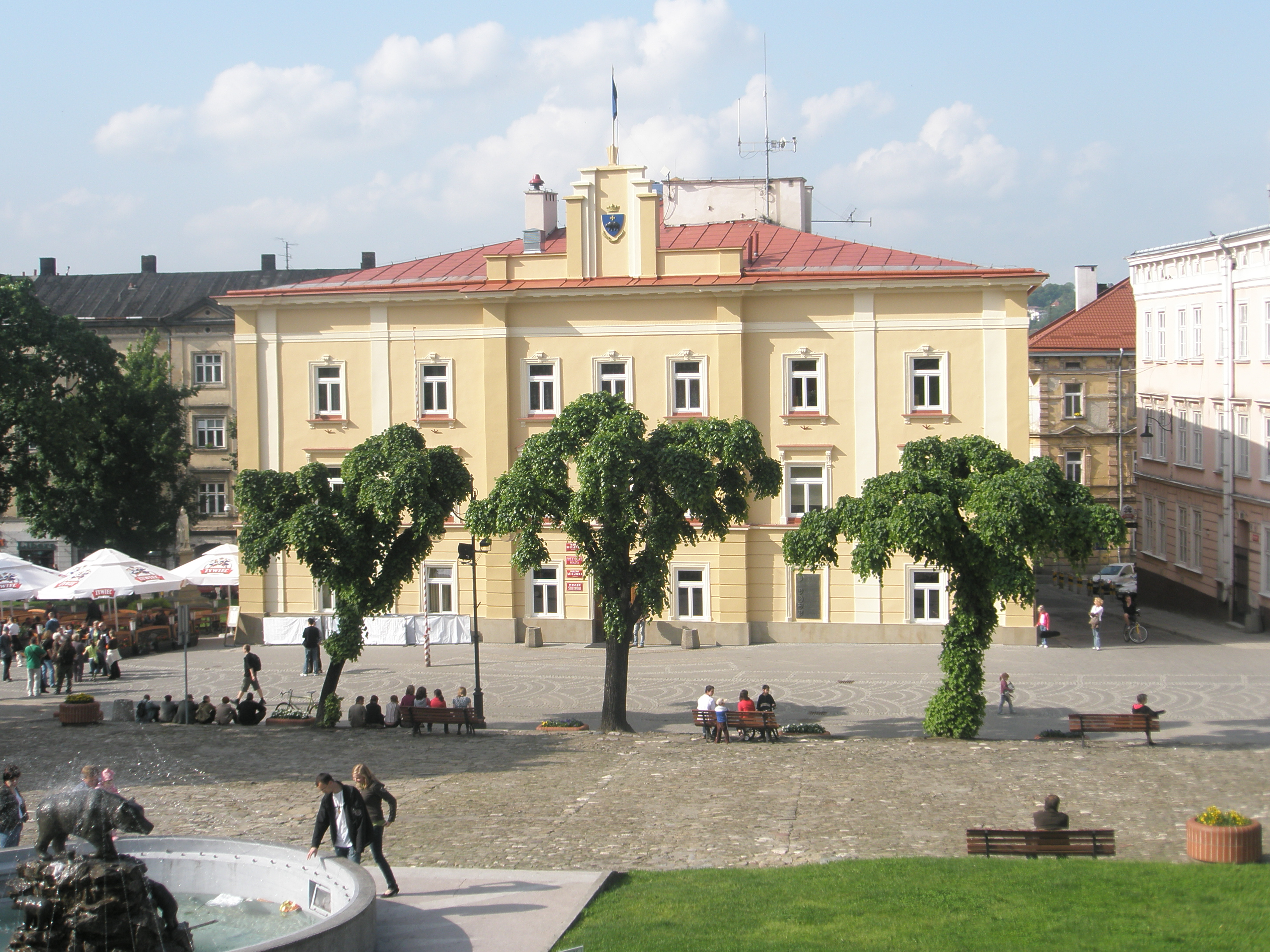 Przemyśl - budynek ratusza i fontanna na rynku